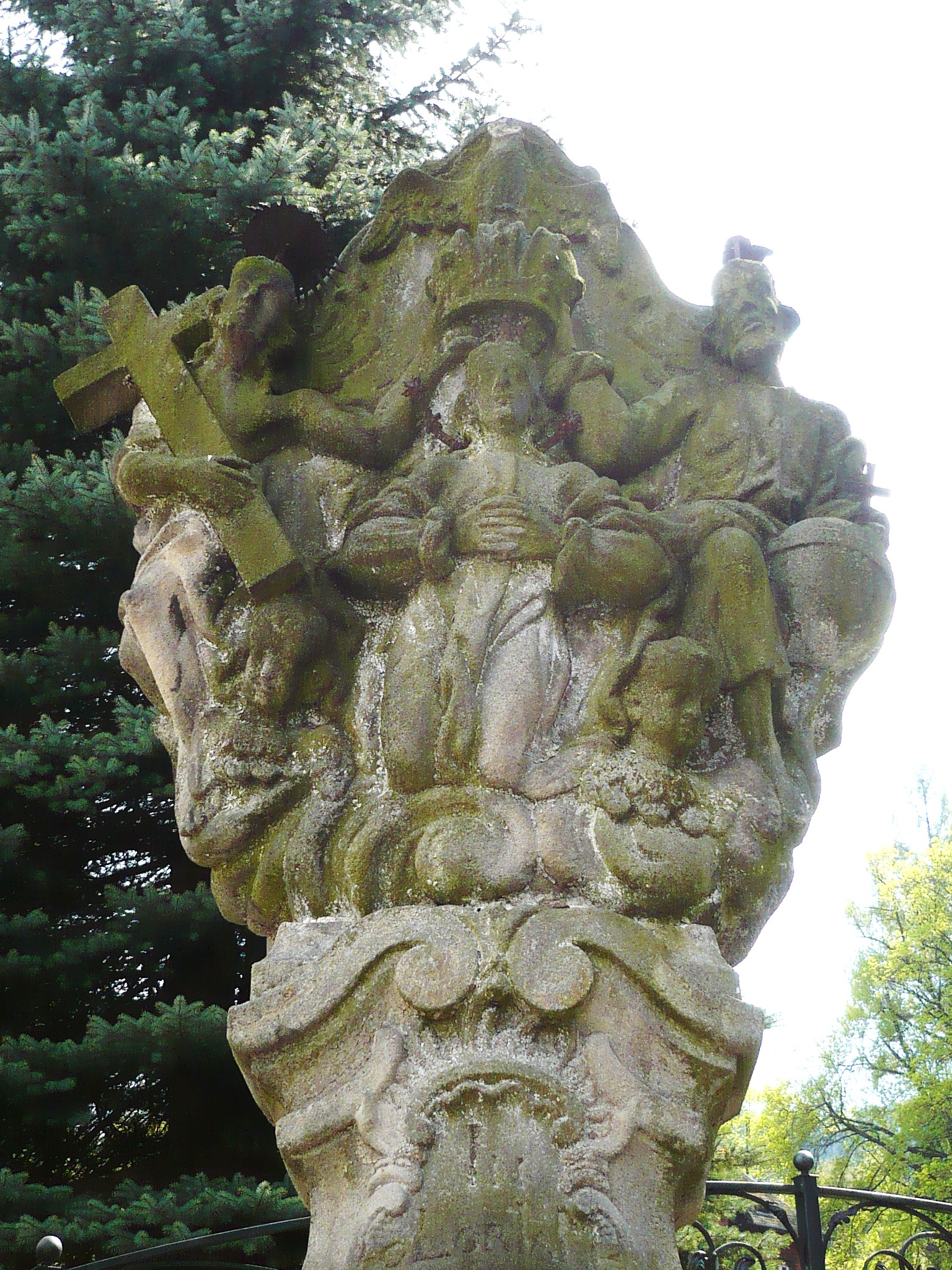 Nowa Ruda, ul. Strzelecka 2 - figura Trójcy Świętej, 1798.